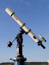 Das Vixen der Sternwarte Heilbronn